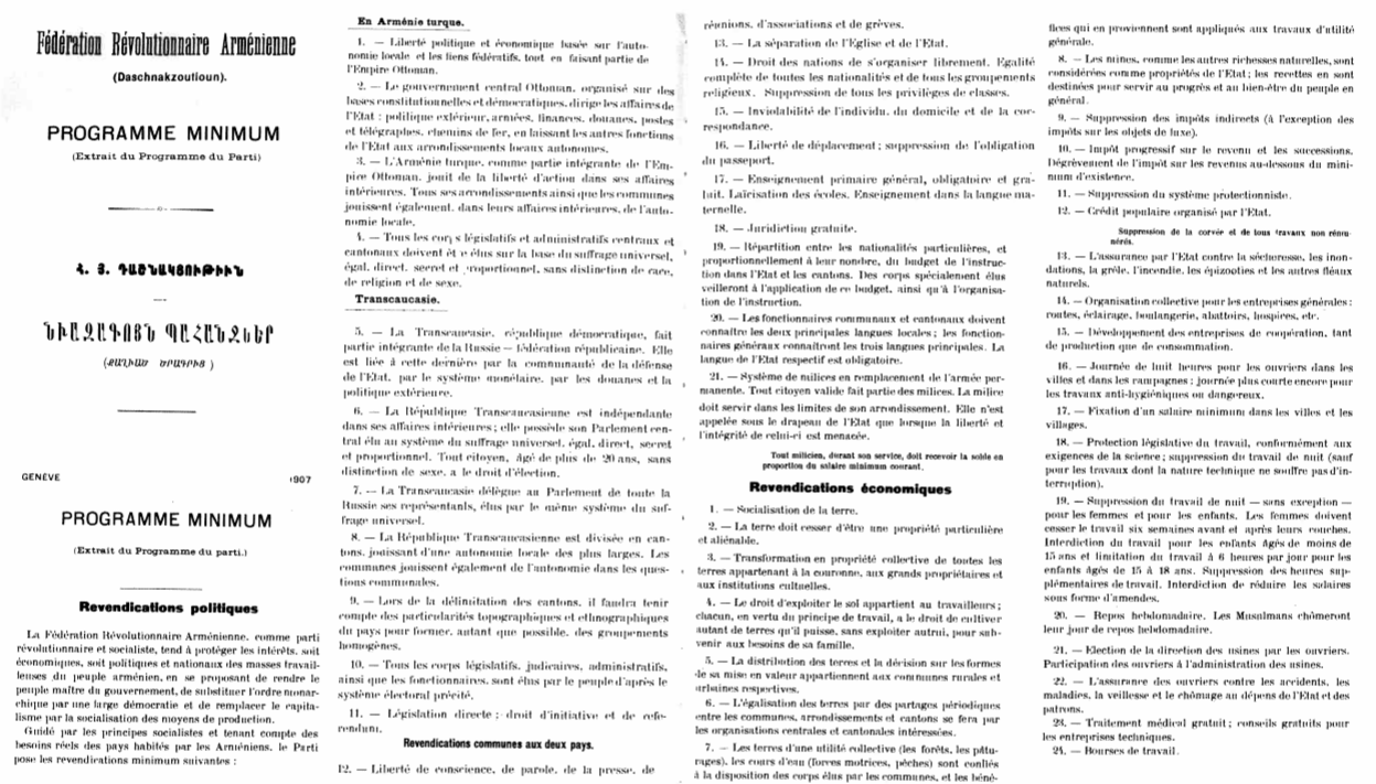 Daschnakzoutioun. Programme minimum (Exstrait du Programme du parti), 1907, Geneve